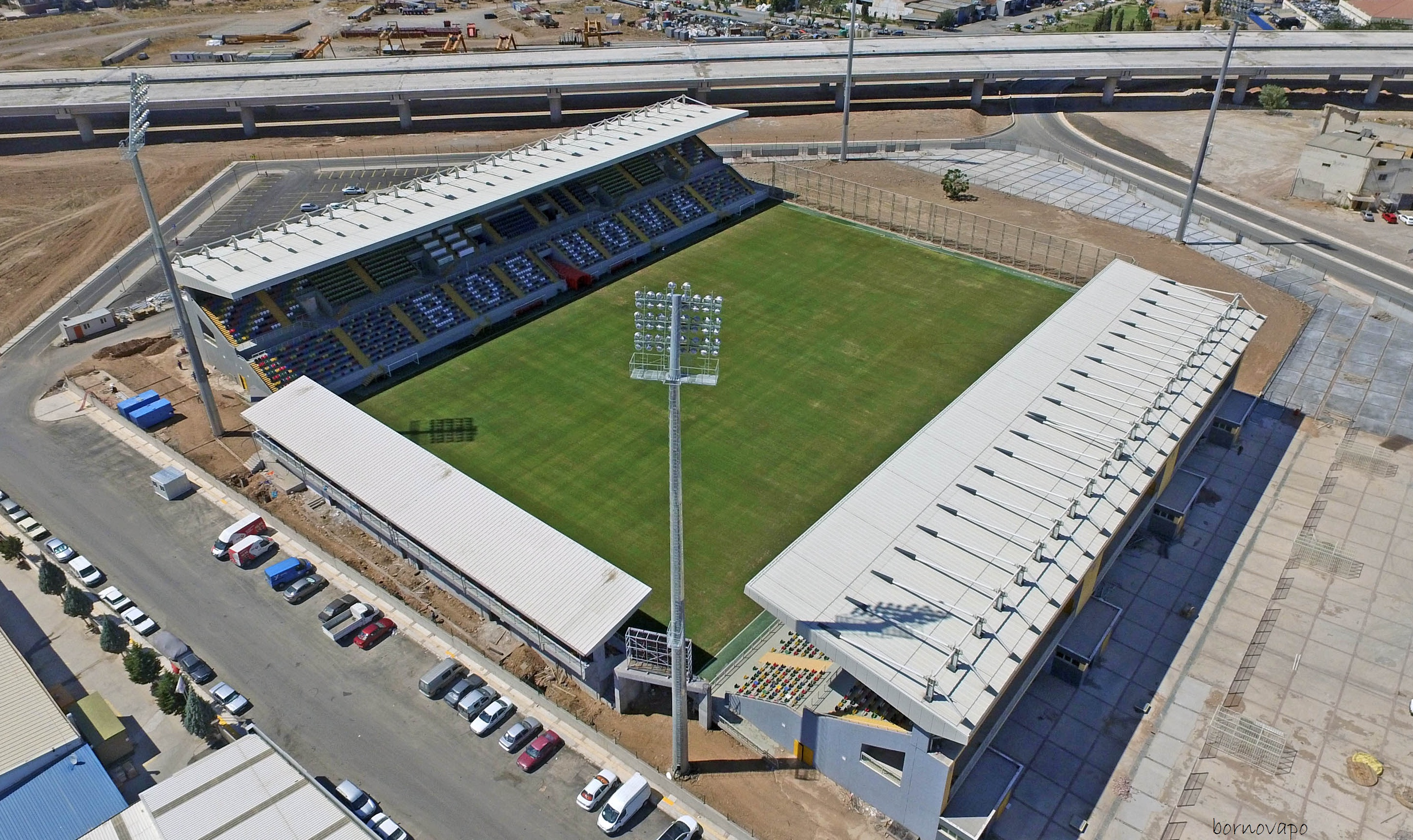 stadyum